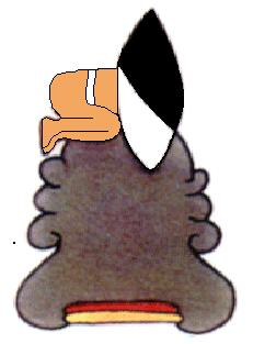 Escudo del municipio de Tepalcingo, Morelos.